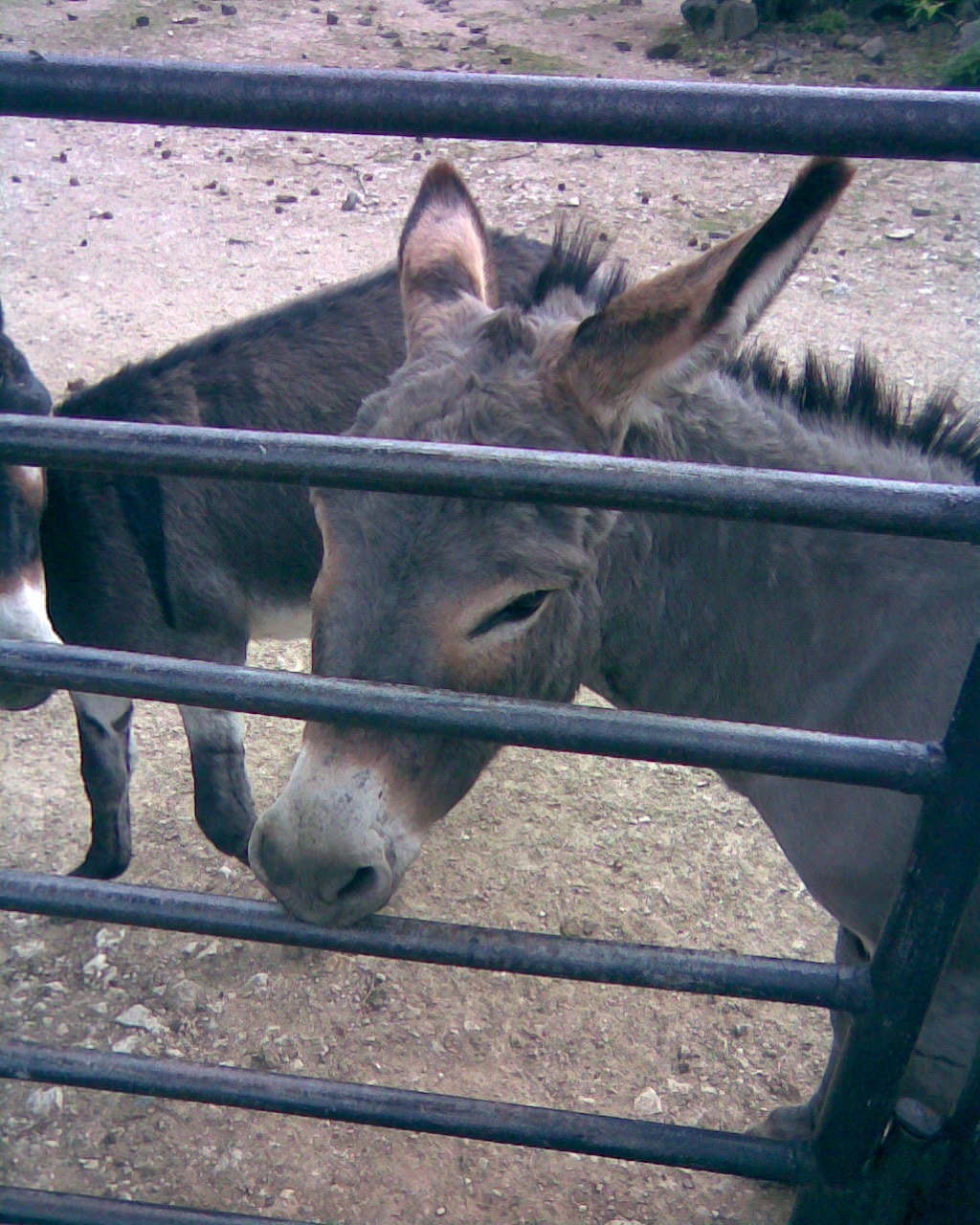 A jackass